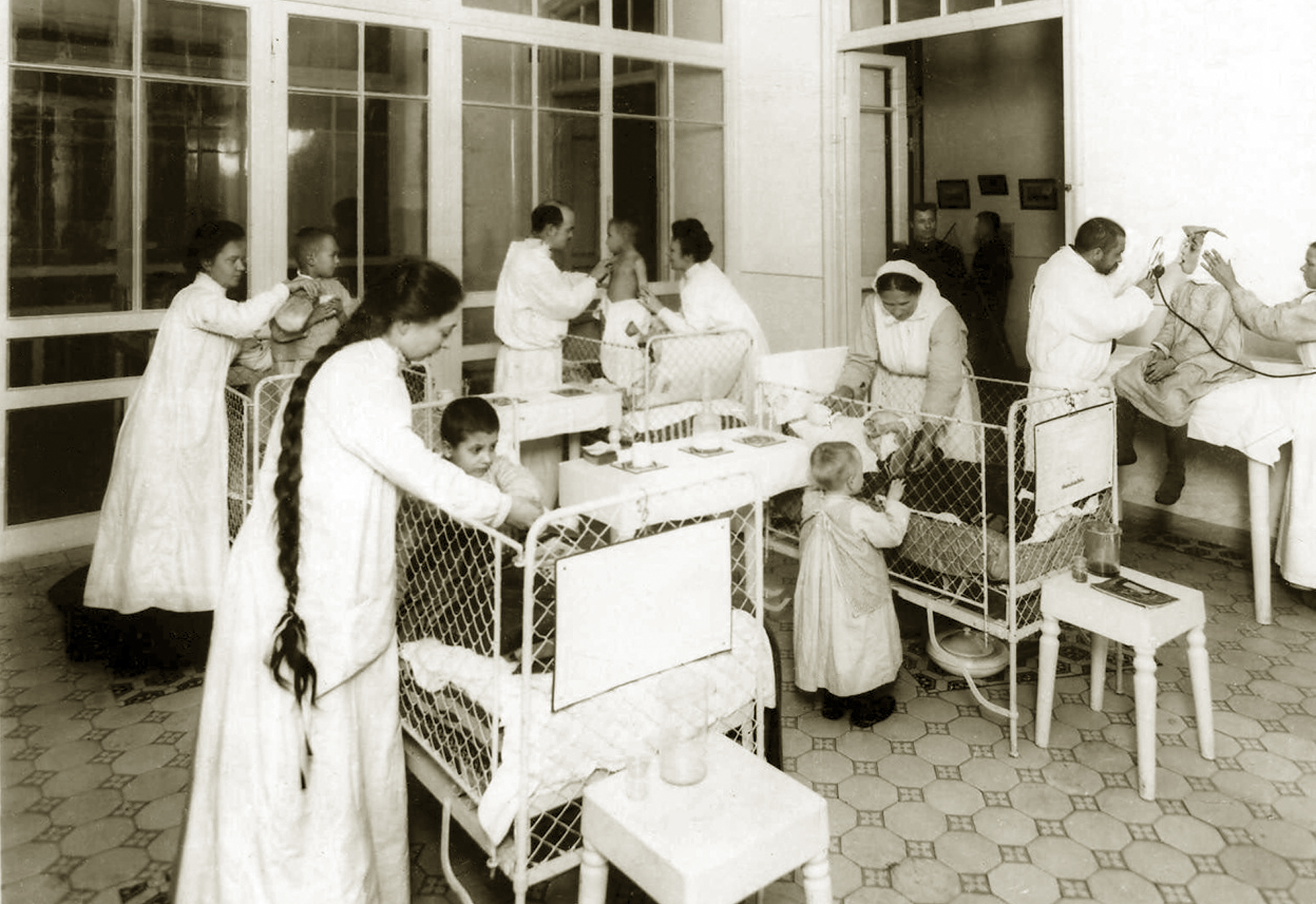 Повседневная работа в детской клинике Женского медицинского института в Петербурге